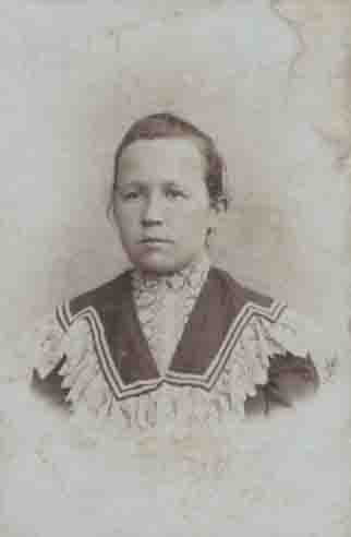 Анна Яковлевна Кропотова, урождённая Буркова, выпускница Уржумской прогимназии, учительница из села Салтакъял, жена Александра Егоровича Кропотова (31 марта 1874 — 1934) — крестьянина, эсера, депутата Государственной думы III созыва от Вятской губернии и Всероссйиского Учредительного собрания.